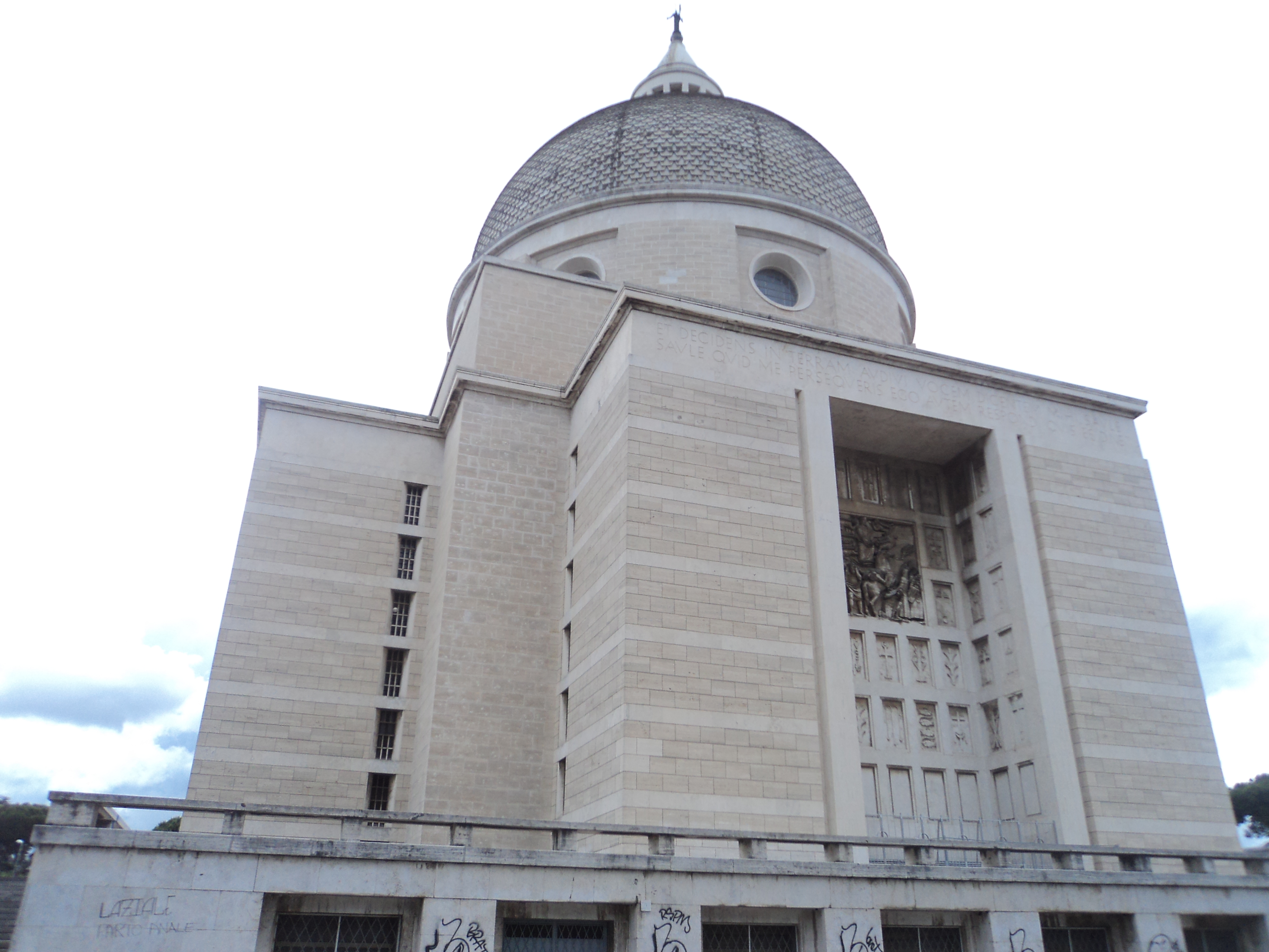 Basilica dei Santi Pietro e Paolo